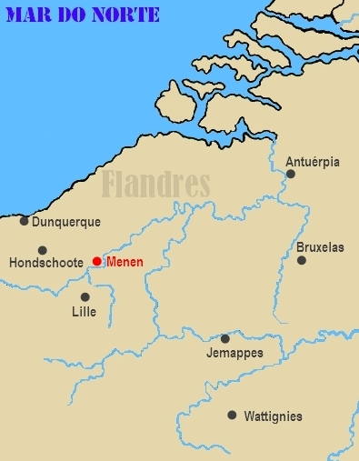 Mapa com a localização de Menen (Menin)